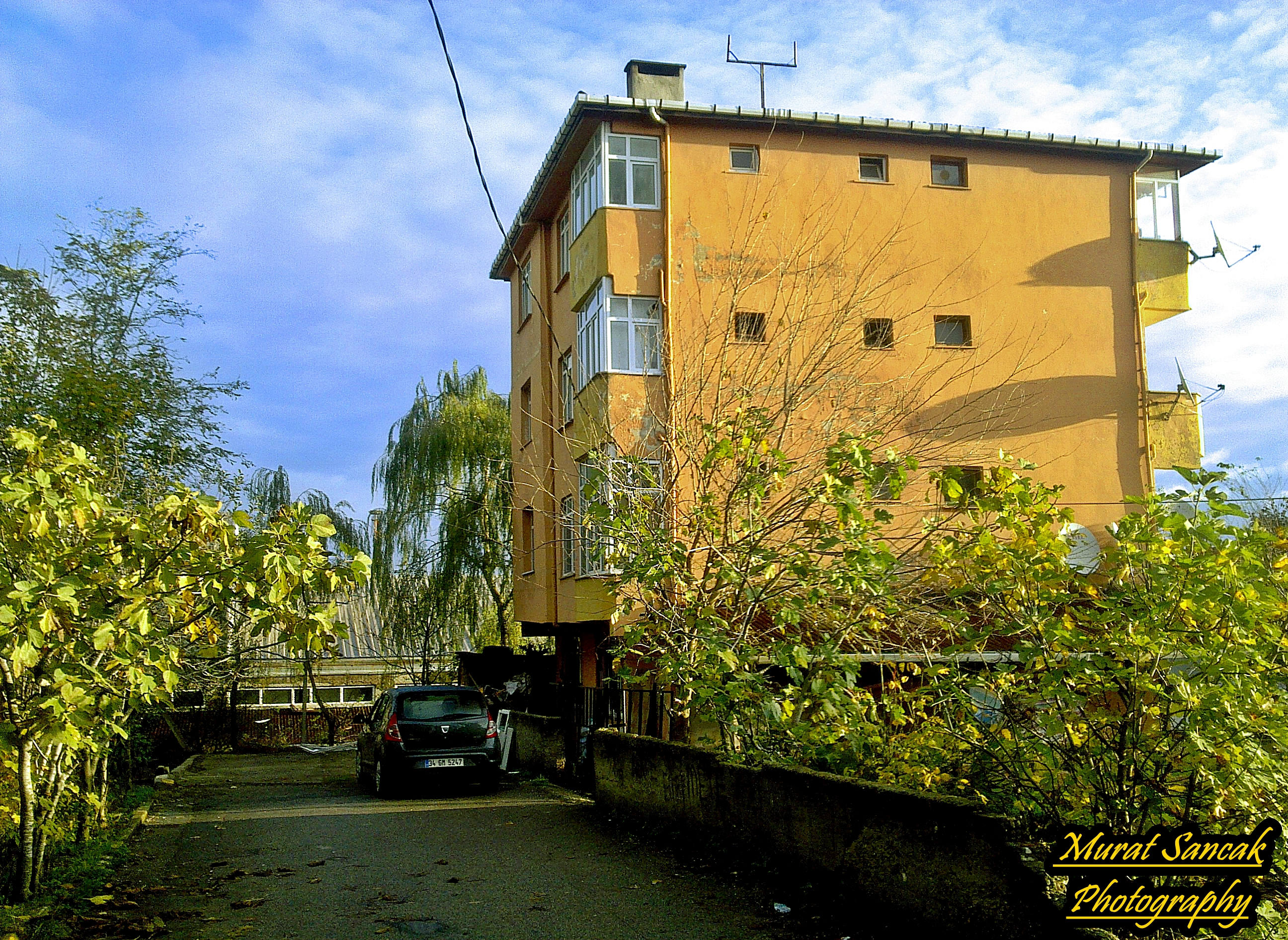 (24.11.2012) - (İSTANBUL - ÇEKMEKÖY - Alemdağ Mahallesi - 101. Sokak)